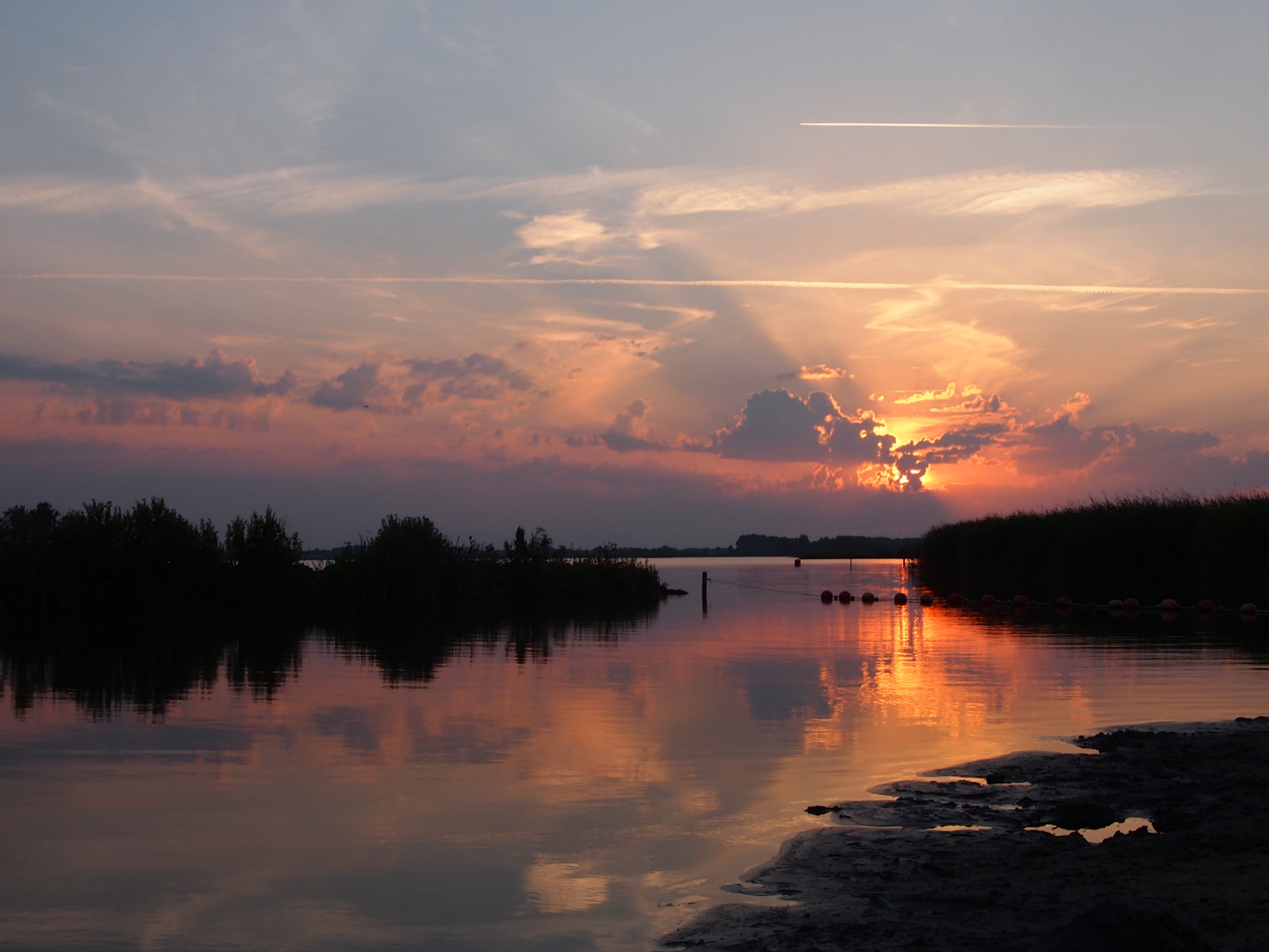 Sunset. De Leyen bij Rottevalle